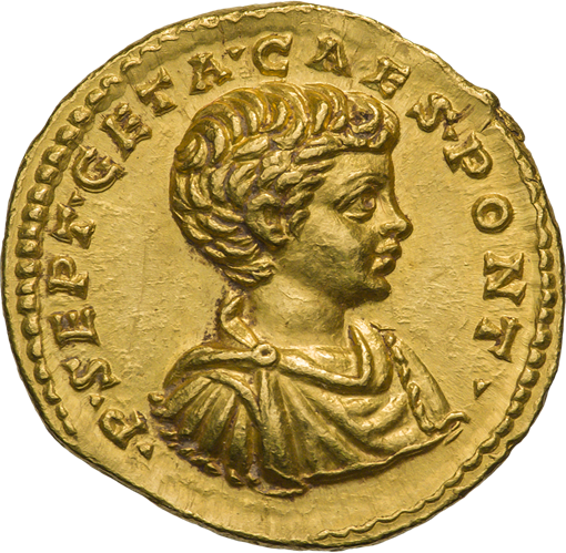 Гета (198—209). Ауреус. Ок. 200—202 гг. Рим. Аверс. Надпись P SEPT GETA CAES PONT. Бюст Геты в панцире и плаще, вправо.